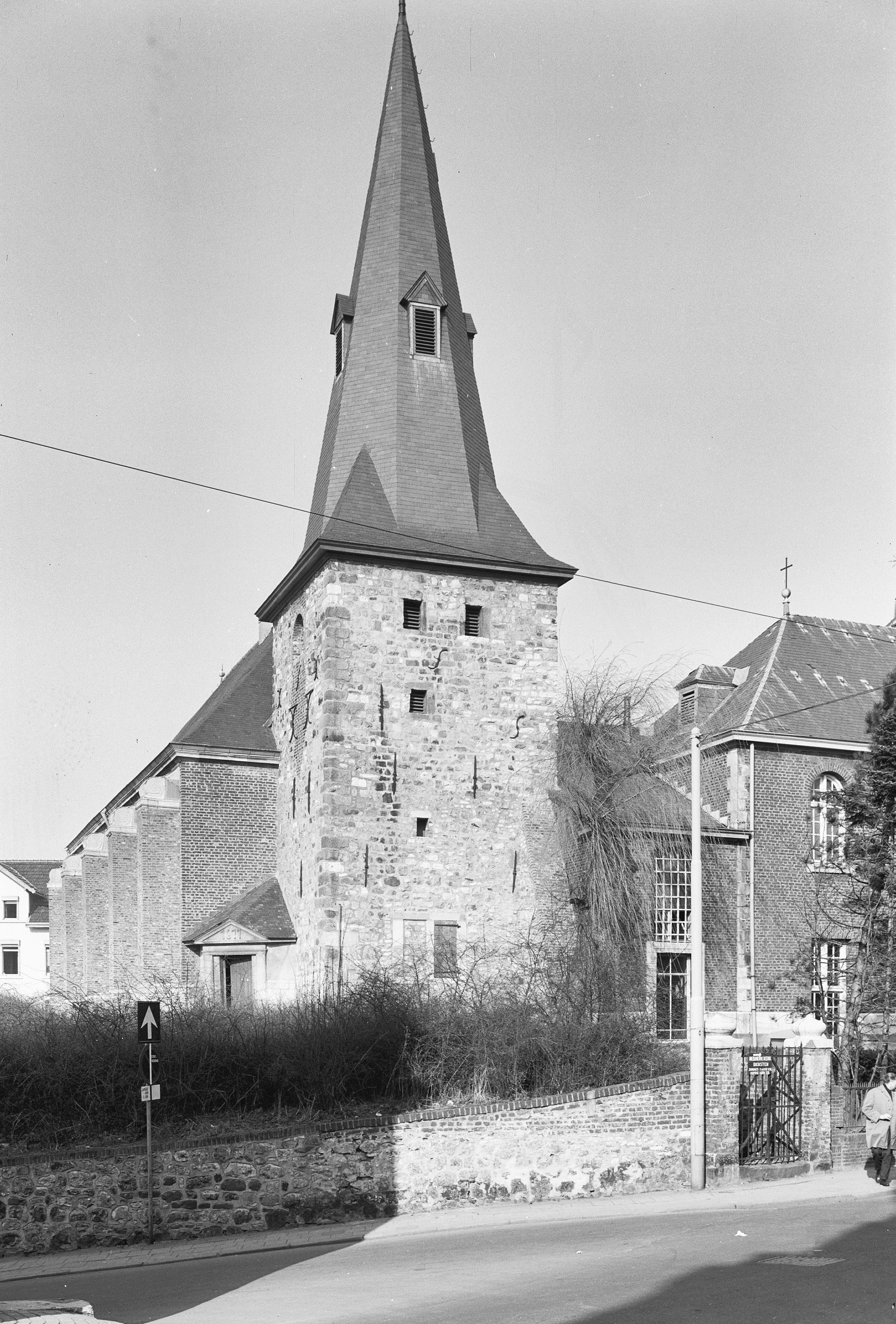 Nederlands Hervormde Kerk: exterieur, Kerkstraat 47